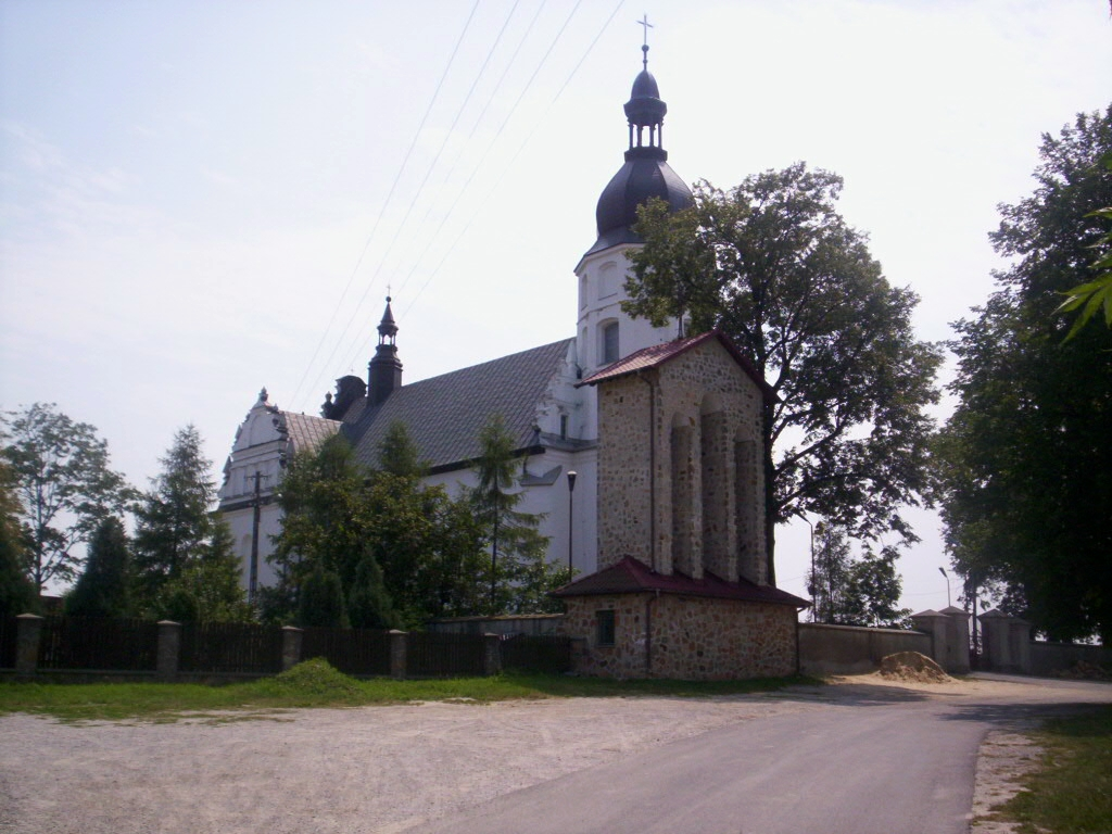 Oleszno - kościół par. p.w. Wniebowzięcia NMP (zabytek nr rejestr. 378)